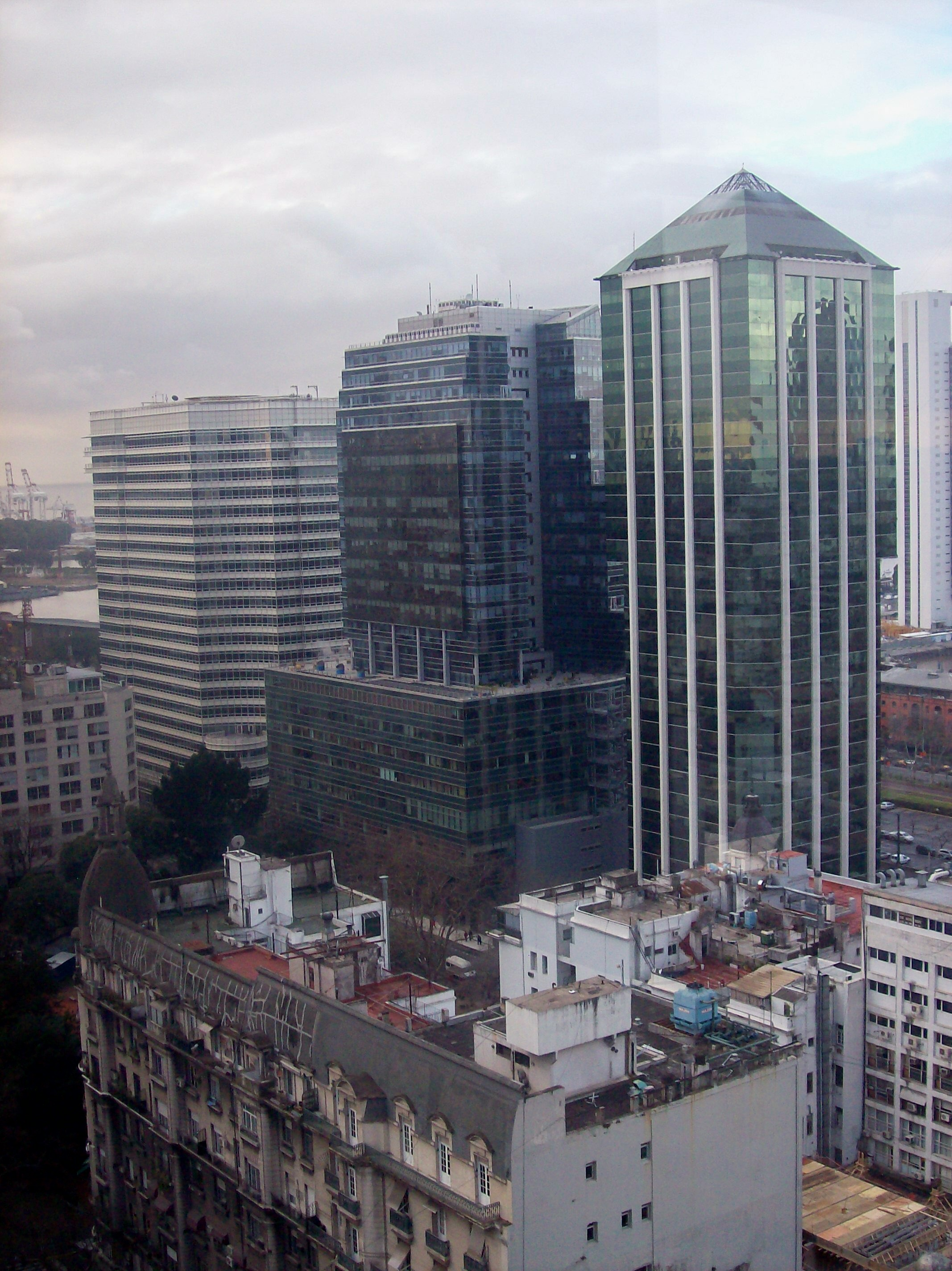 A la izquierda, Edificio República (César Pelli), Torre Bouchard Plaza y Torre Bouchard en Buenos Aires, Argentina, visto desde el techo del edificio Comega. Al fondo, Reserva Ecológica.